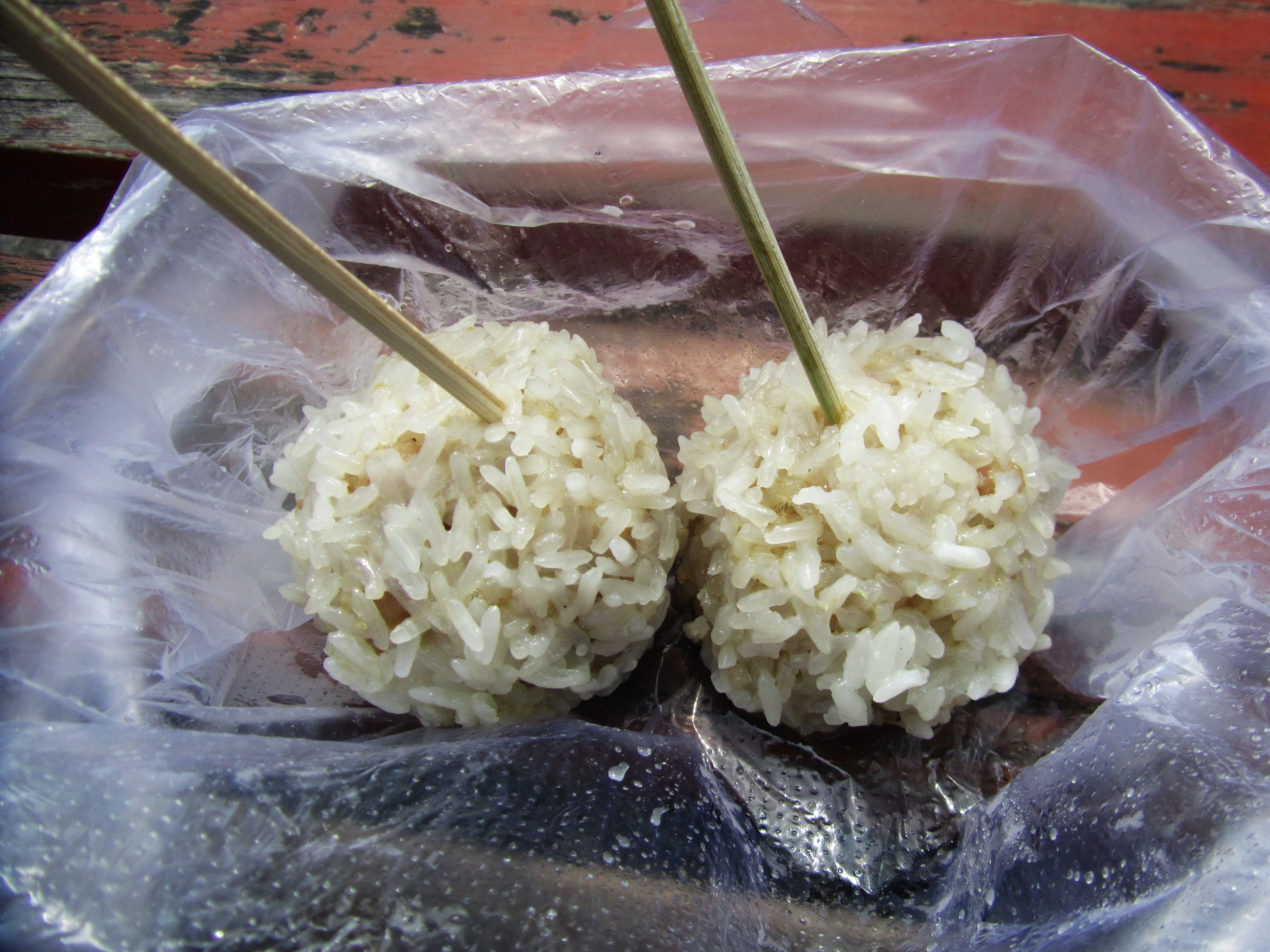 粢毛肉圆，摄于杭州余杭区塘栖镇。